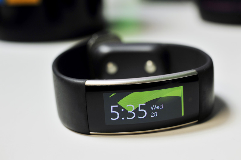 Microsoft Band 2 mostrando el Me Tile en la pantalla.